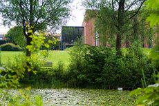 Diakonhøjskolen